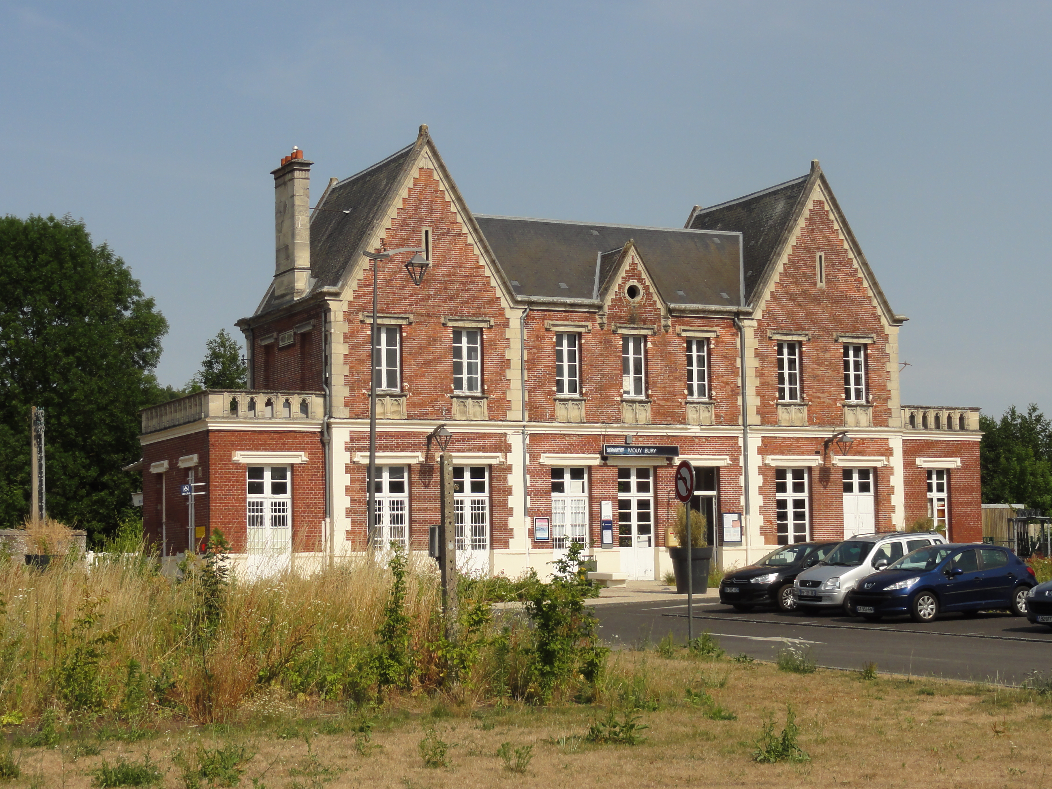 Bâtiment voyageurs, côté ville.